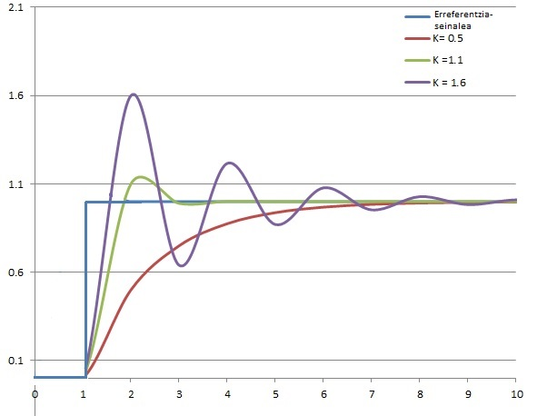 2. Irudia- Ekintza proportzionalaren erantzuna denbora-eremuan[6].